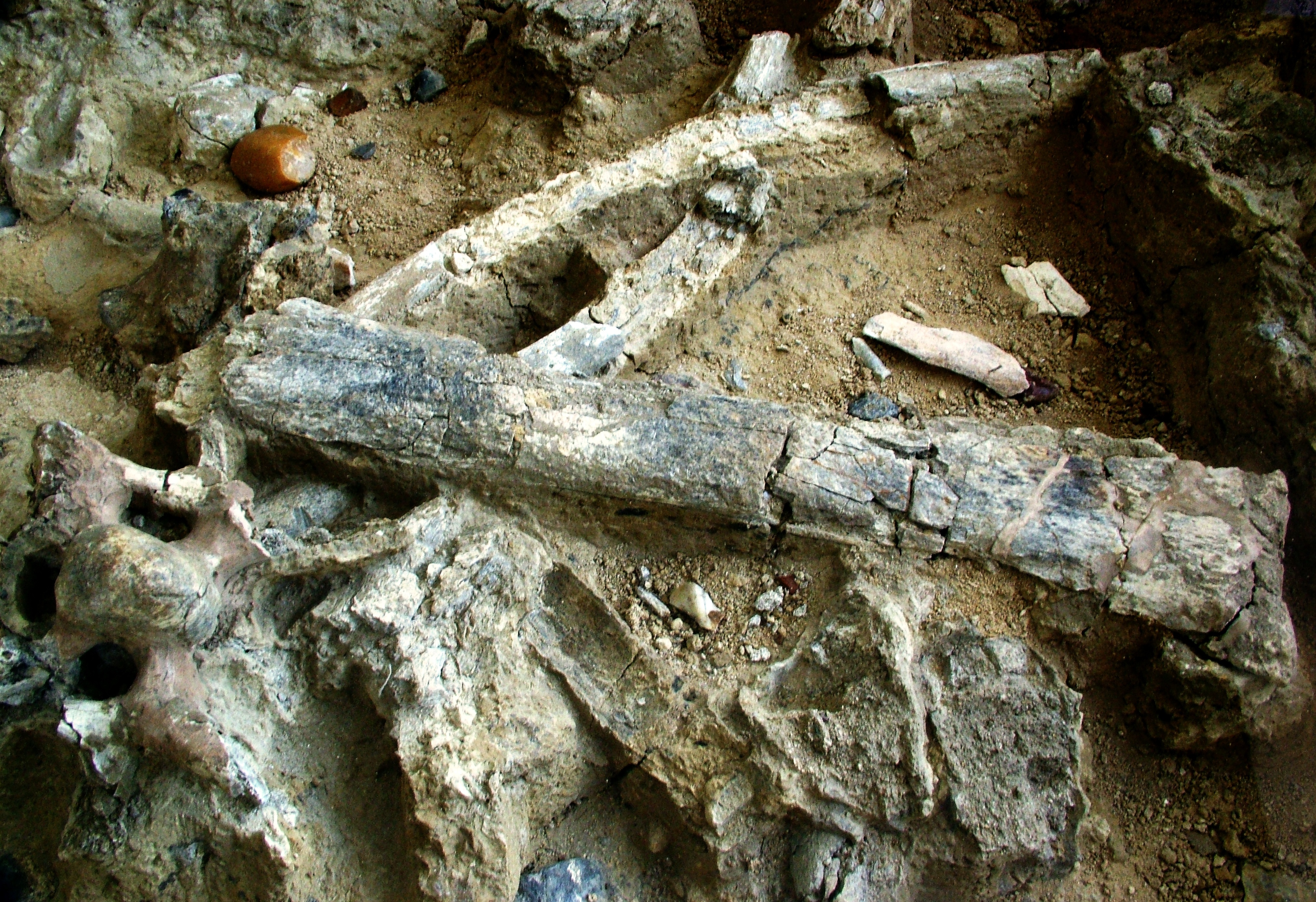 Őskőkori leletek (Vértesszőlős Őstelep)